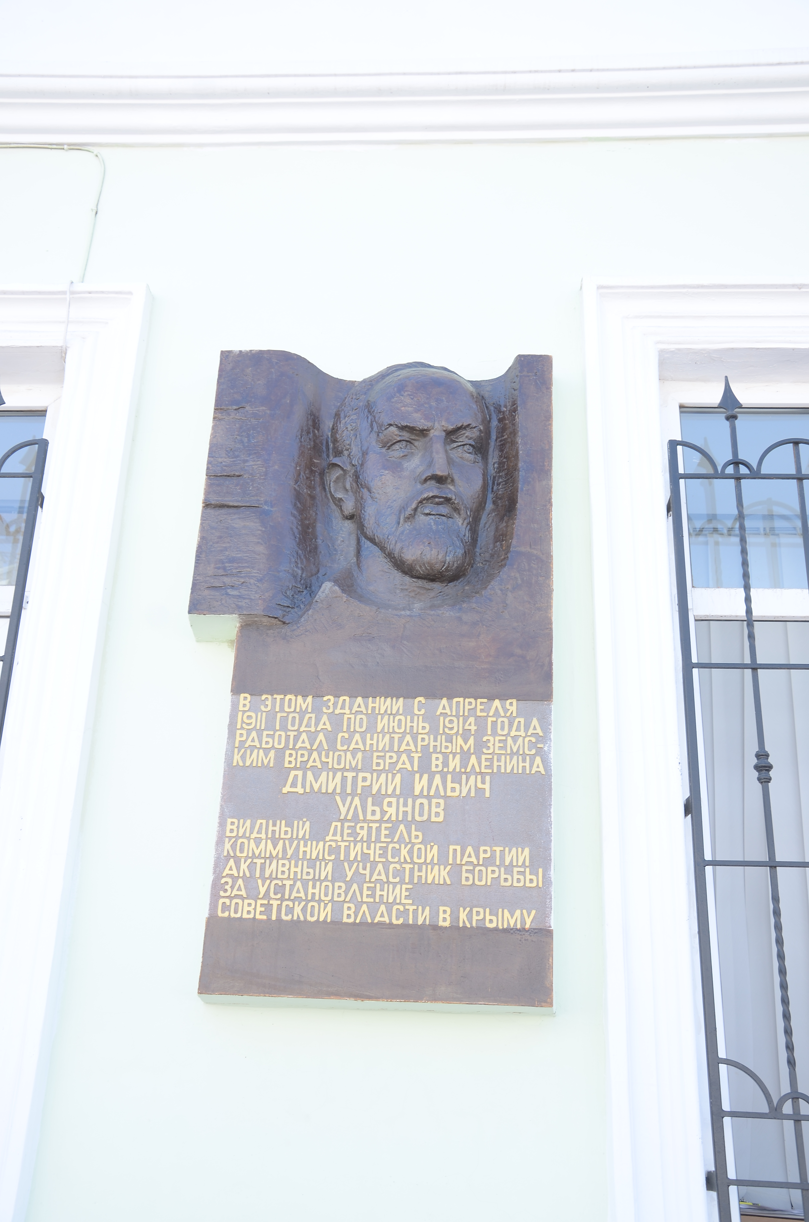 Феодосия